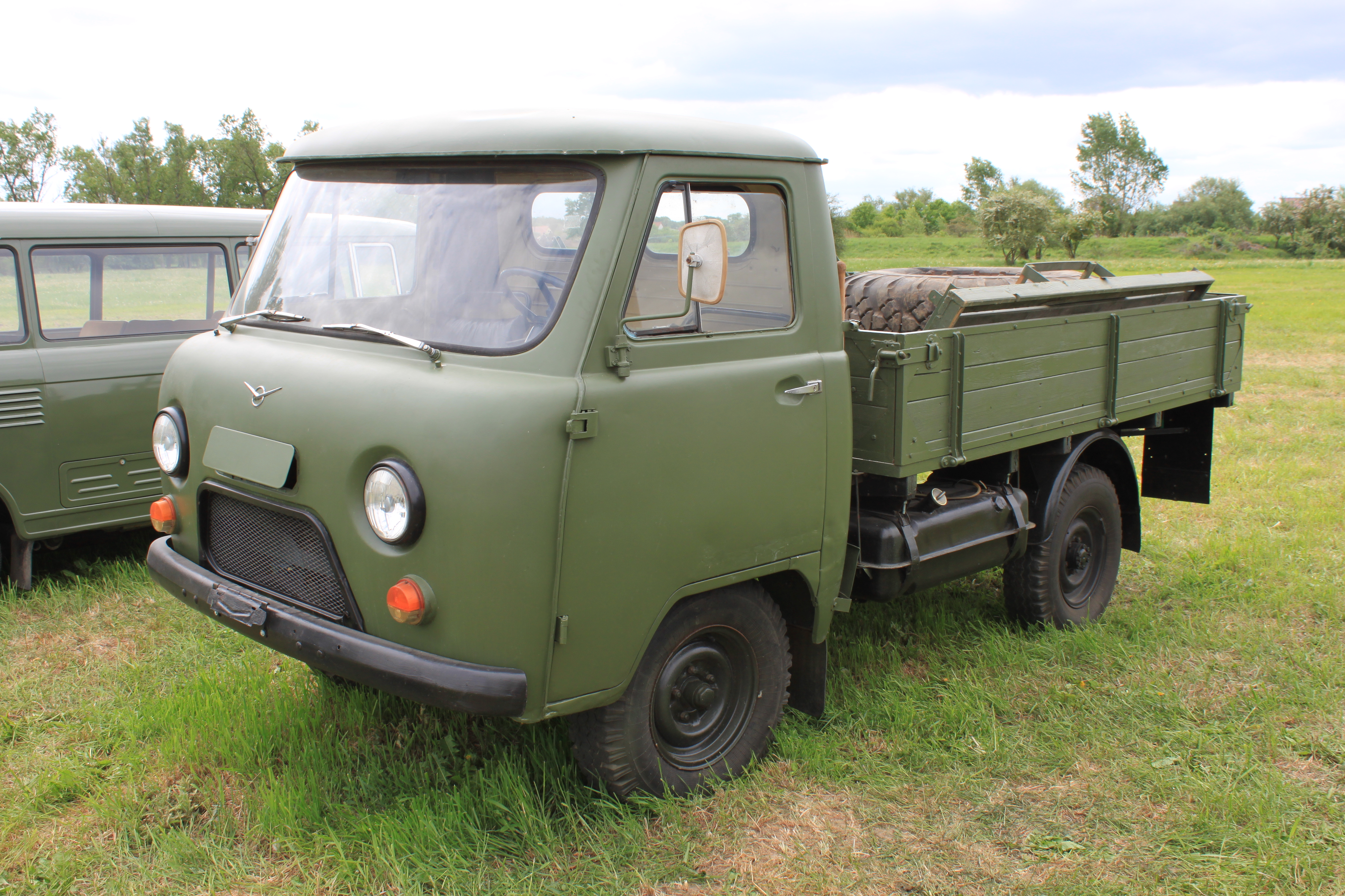 UAZ 451DM